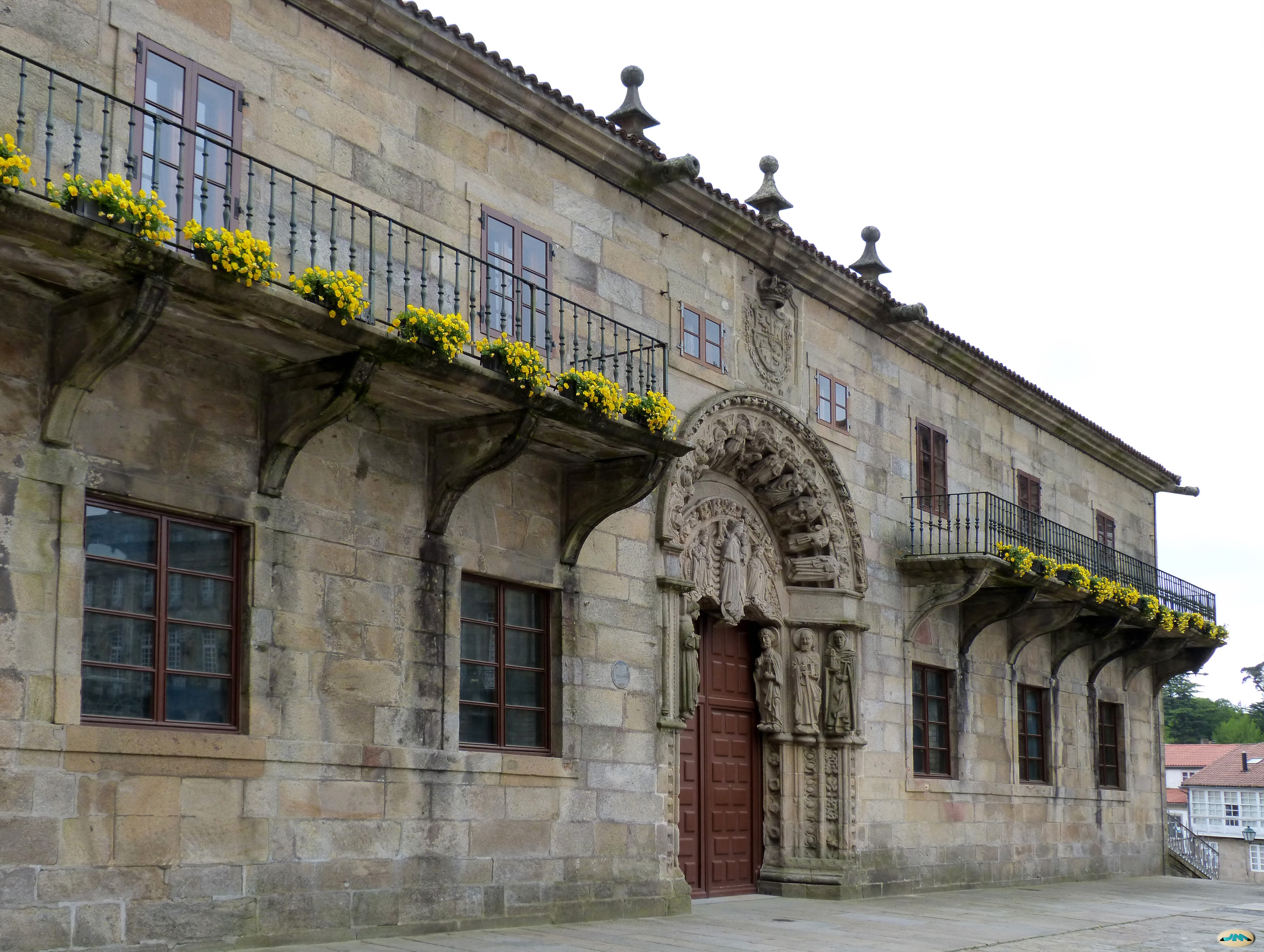 Santiago-Colegio de san Jerónimo